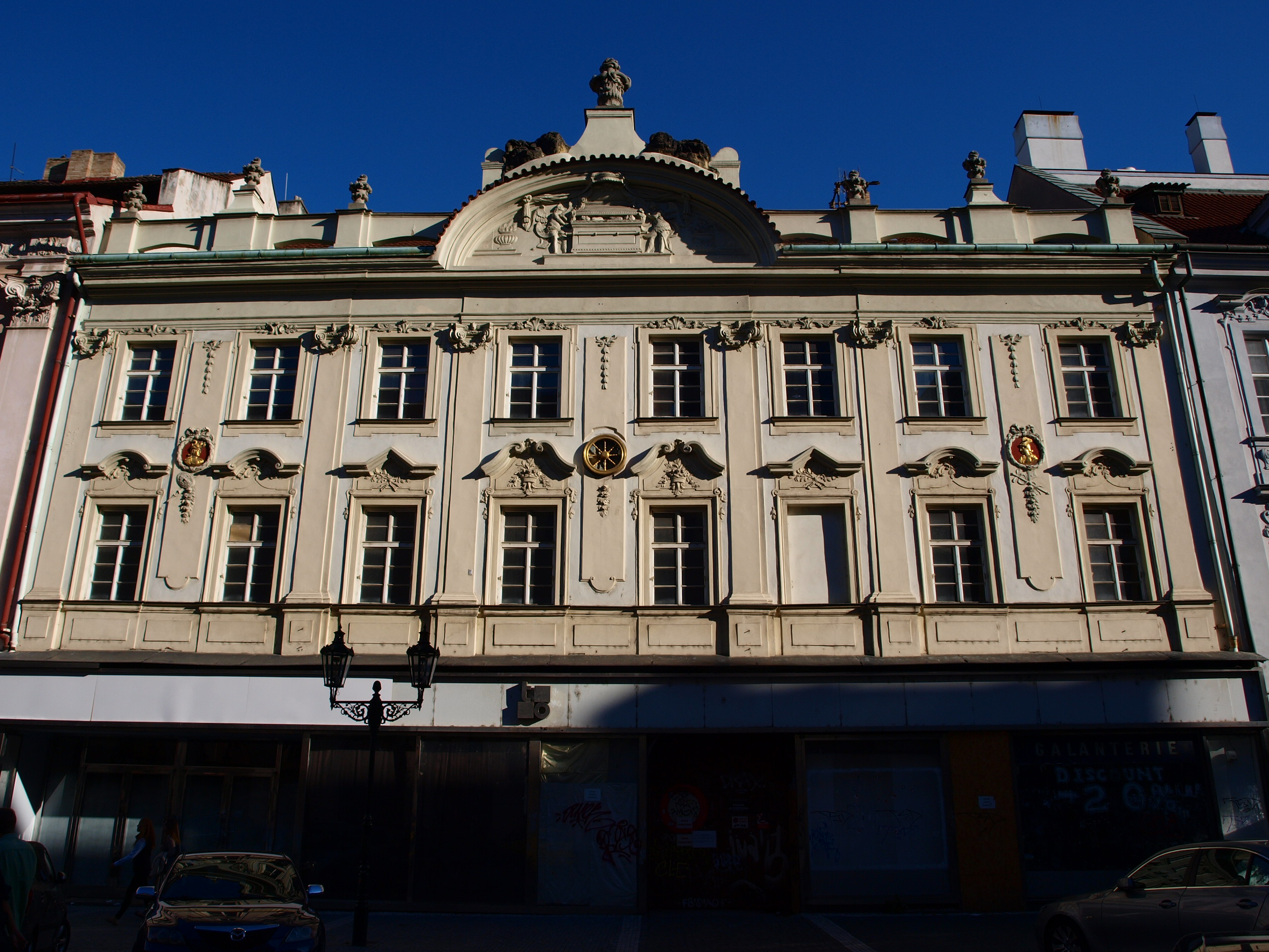 Wimmerův palác, Rytířská 18